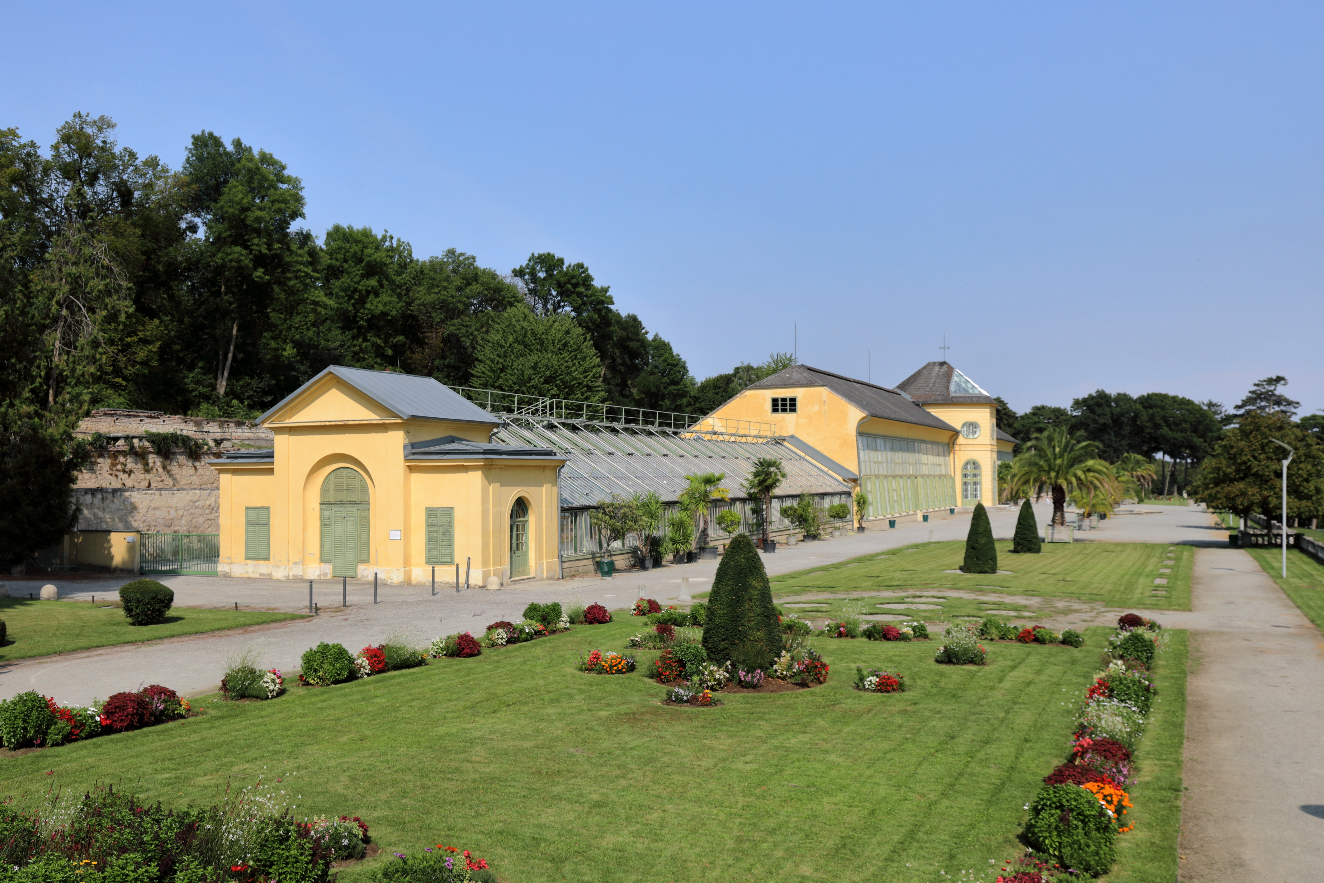 Die Orangerie im Schlosspark der burgenländischen Hauptstadt Eisenstadt. Ihre heutige Gestalt erhielt sie Ende des 19. Jahrhunderts, als der Mittelpavillon für eine Palme aufgestockt wurde.